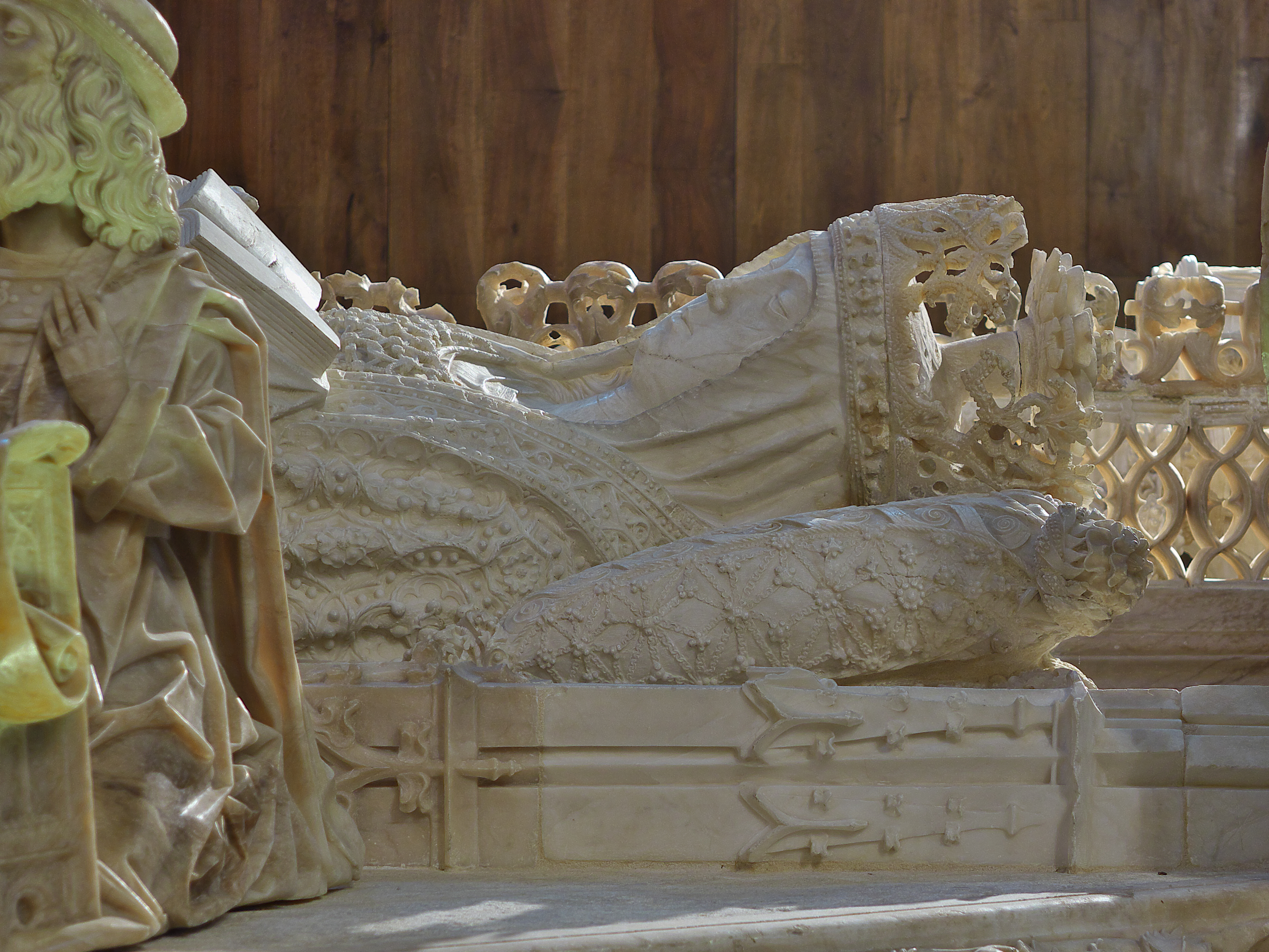 Detalle del sepulcro de Isabel de Portugal y Braganza (+1496). Realizada personal y magistralmente en alabastro por Gil de Siloé. La yacente, la representa idealizada, joven, que al terminar los sepulcros (1489-1493) alcanzaría la edad próxima a los 65 años.